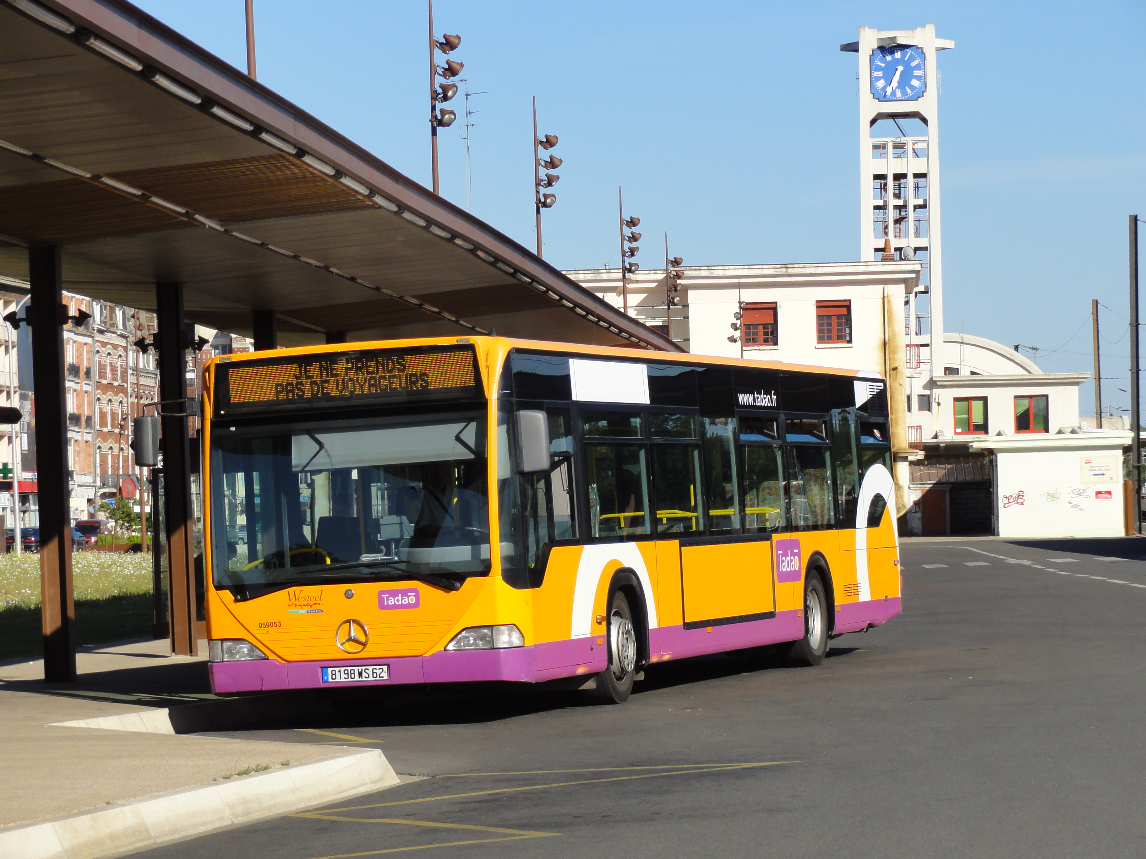 Bus Tadao à Lens, Pas-de-Calais, Nord-Pas-de-Calais, France.